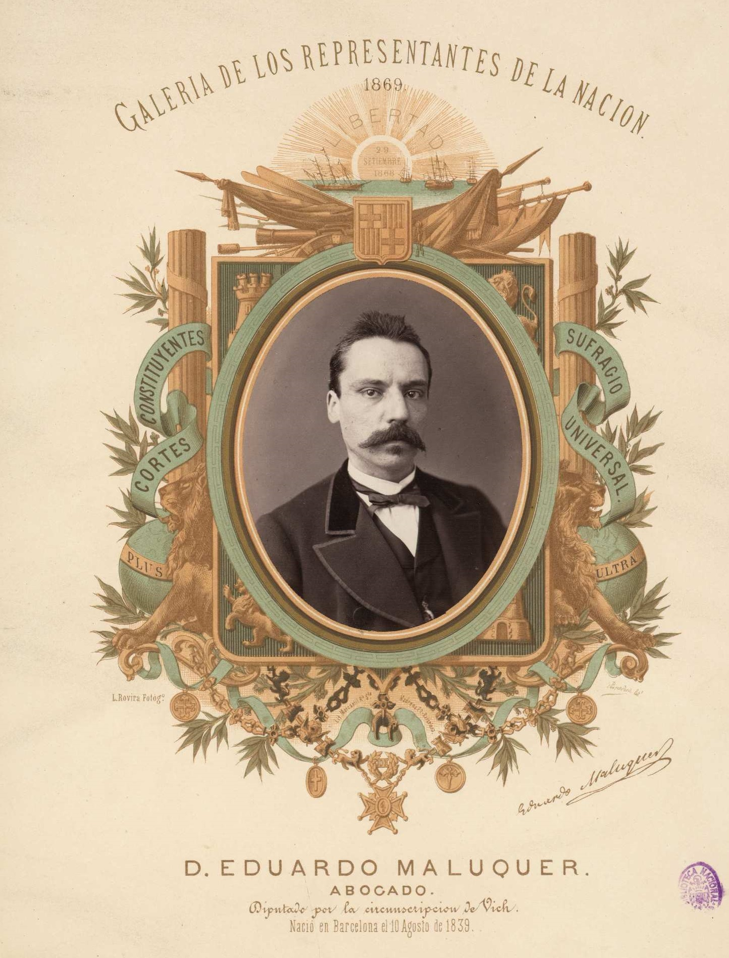 Retrato de Eduardo Maluquer. Fotografía de Leopoldo Rovira en orla litográfica de Magín Pujadas. Inscripción: "GALERIA DE LOS REPRESENTANTES DE LA NACIÓN./1869/ D. EDUARDO MALUQUER./ABOGADO./Diputado por la circunscripción de Vich./Nació en Barcelona el 10 de Agosto de 1839" Facsímil del autógrafo "Eduardo Maluquer"